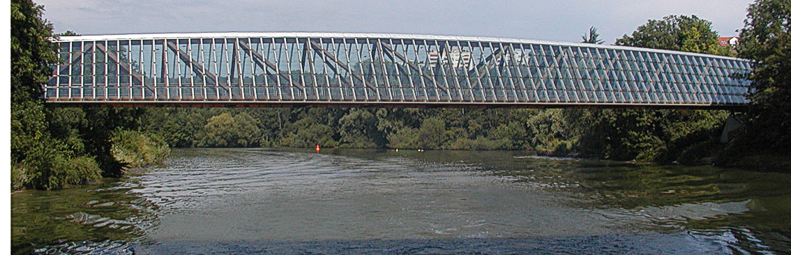 Die Rad- und Fußgängerbrücken über den Neckar